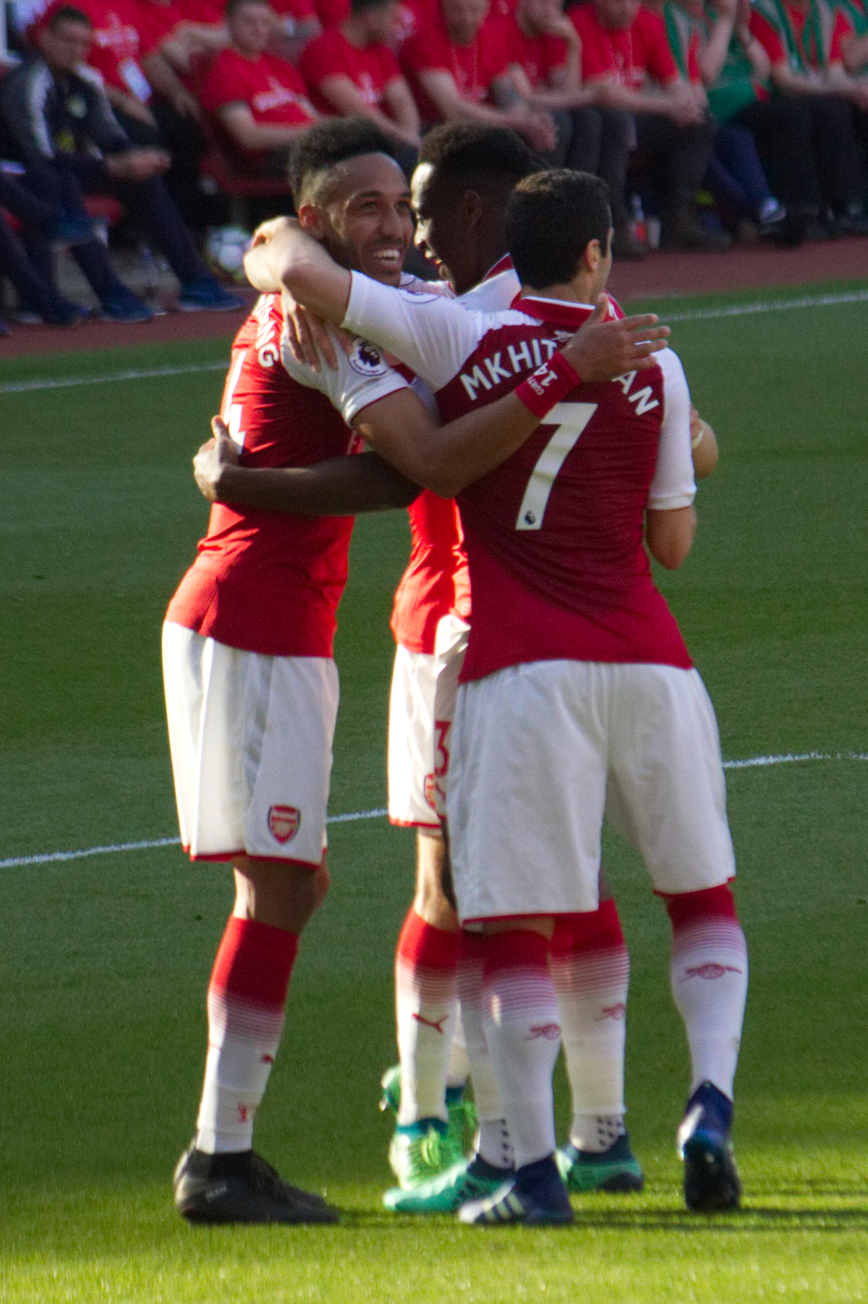 25 Merci Arsène - Celebrating Aubameyang's goal